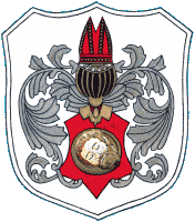 Herb miasta Koszalina w latach 1800-1939, modyfikacja herbu z ok.1440-1800